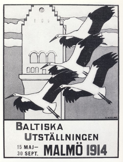 Utställningsaffisch till "Baltiska Utställningen 1914"